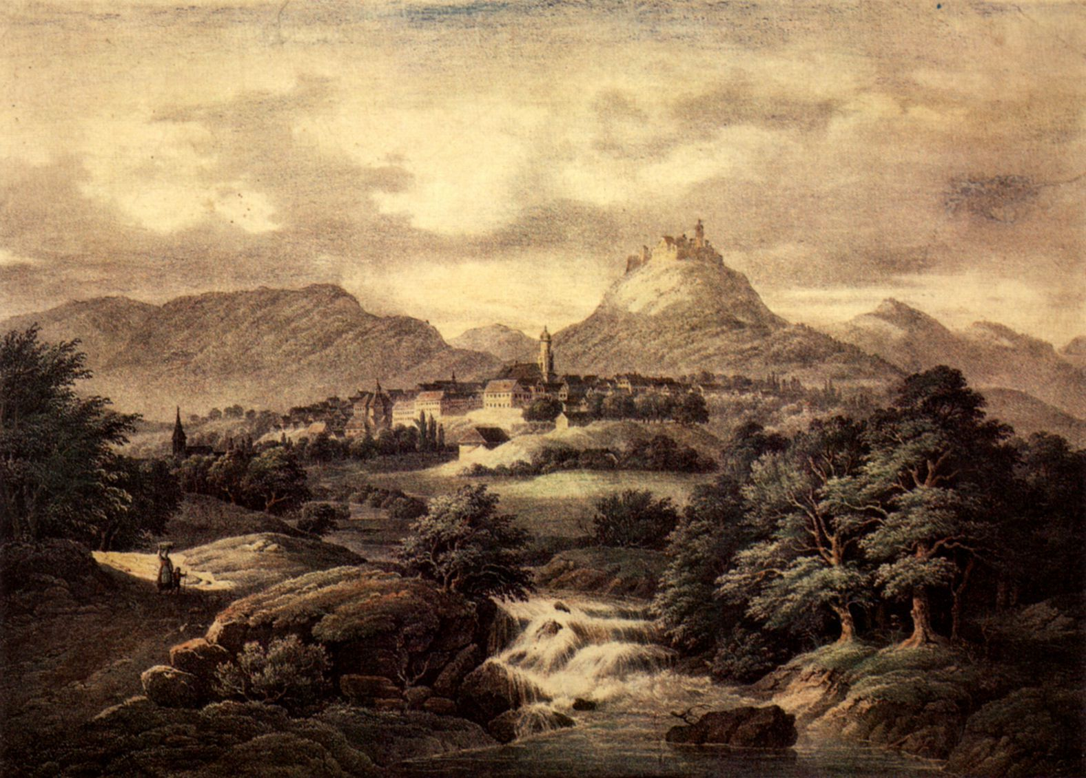 Litographie der Residenzstadt Hechingen mit Burg Hohenzollern.